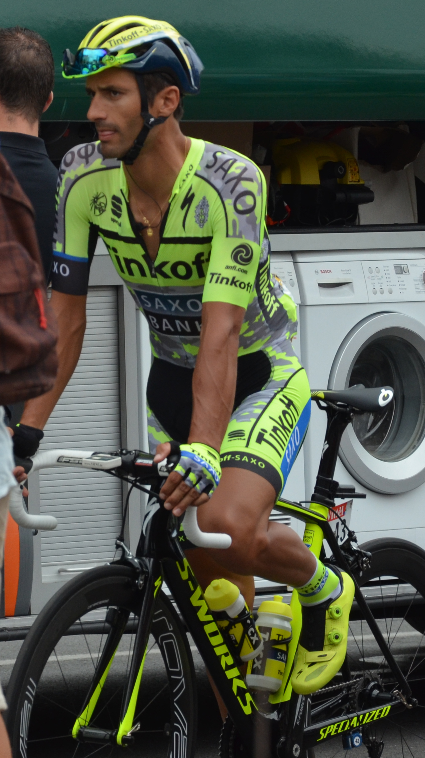 Daniele Bennati au départ de la 8ème étape du Tour de France 2015, à Rennes.